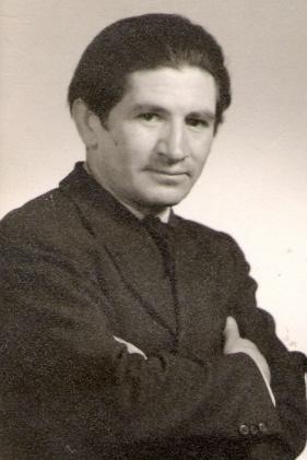 Fotografía de archivo familiar del escultor Rómulo Rozo y el embajador Miguel A. Menendez en una recepción en la Embajada de México en Colombia, 1942.